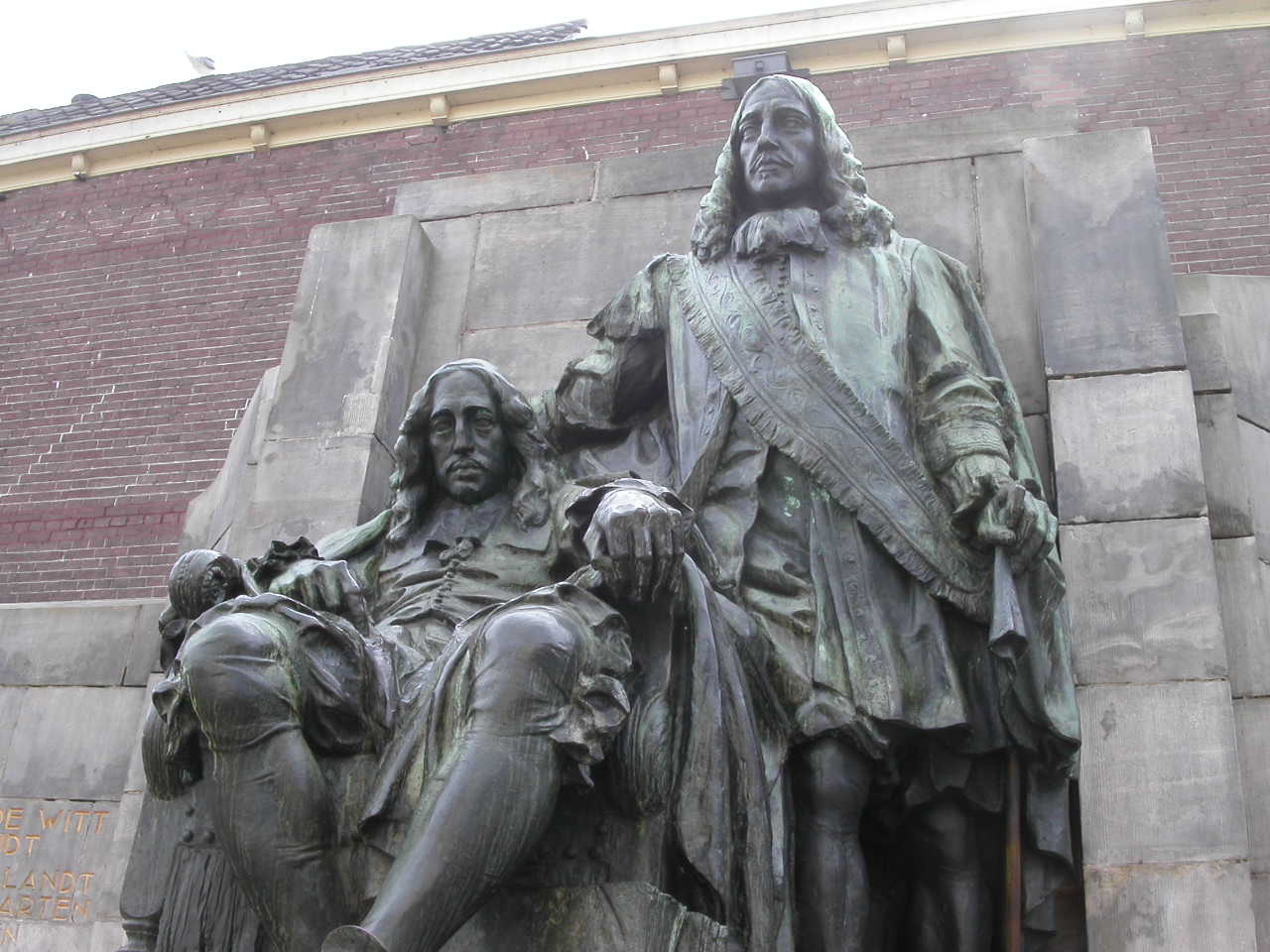 Beeld van Johan en Cornelis de Witt in Dordrecht, eigen foto, publiek domein